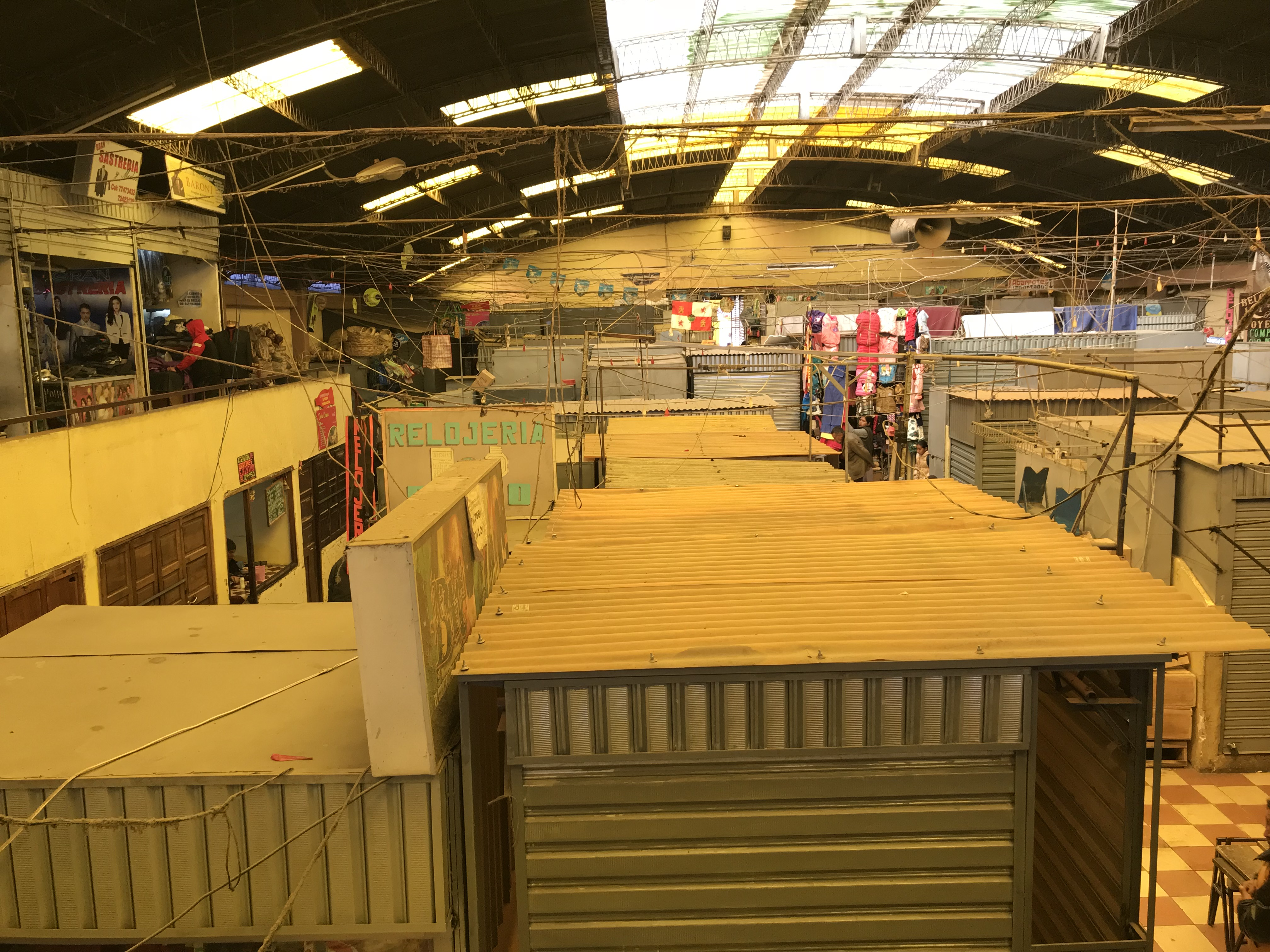 Tiendas y anaqueles del Mercado Central donde se expenden diferentes productos para el consumo de la población potosina.